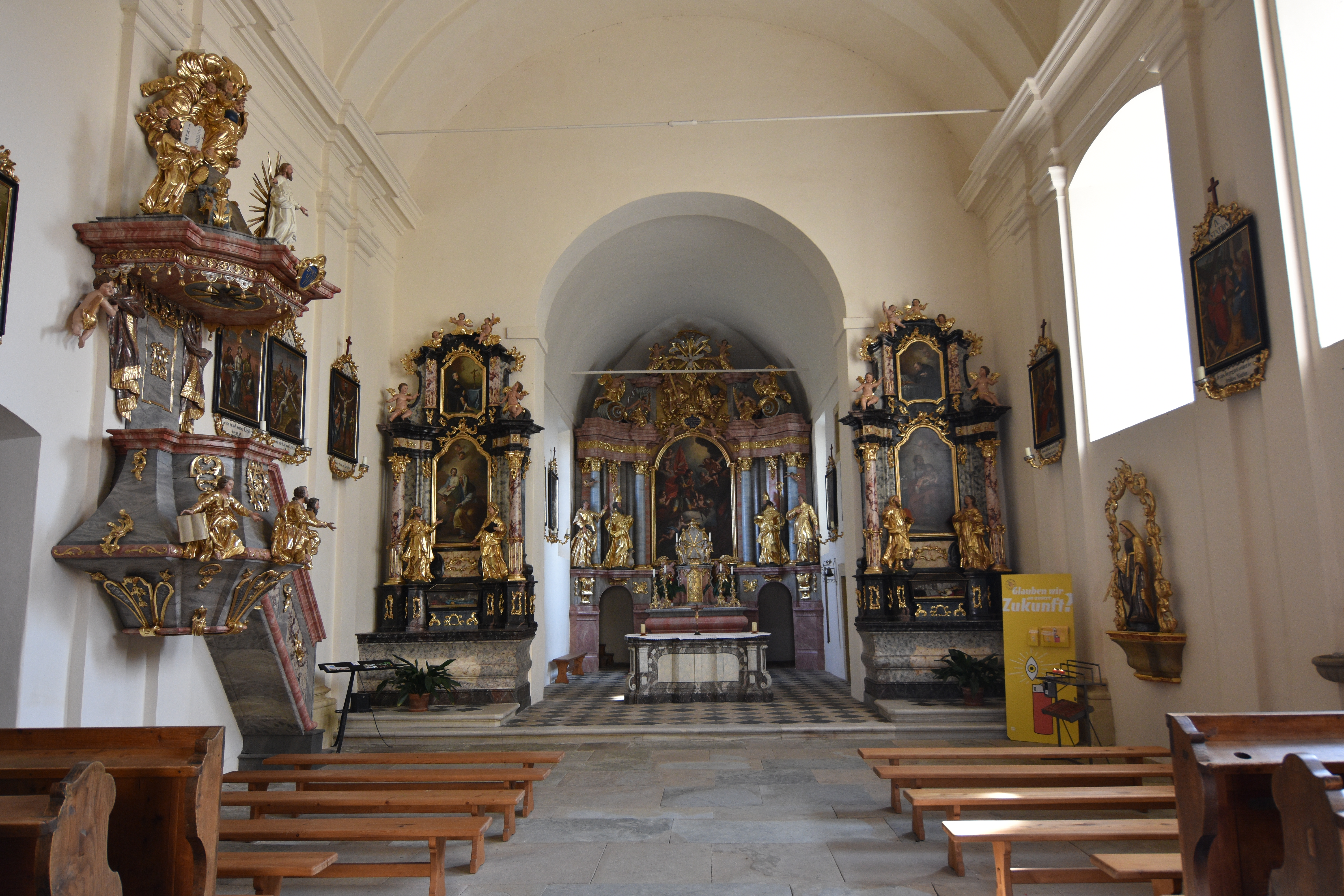 Saint Florian Church (Straden) - Interior